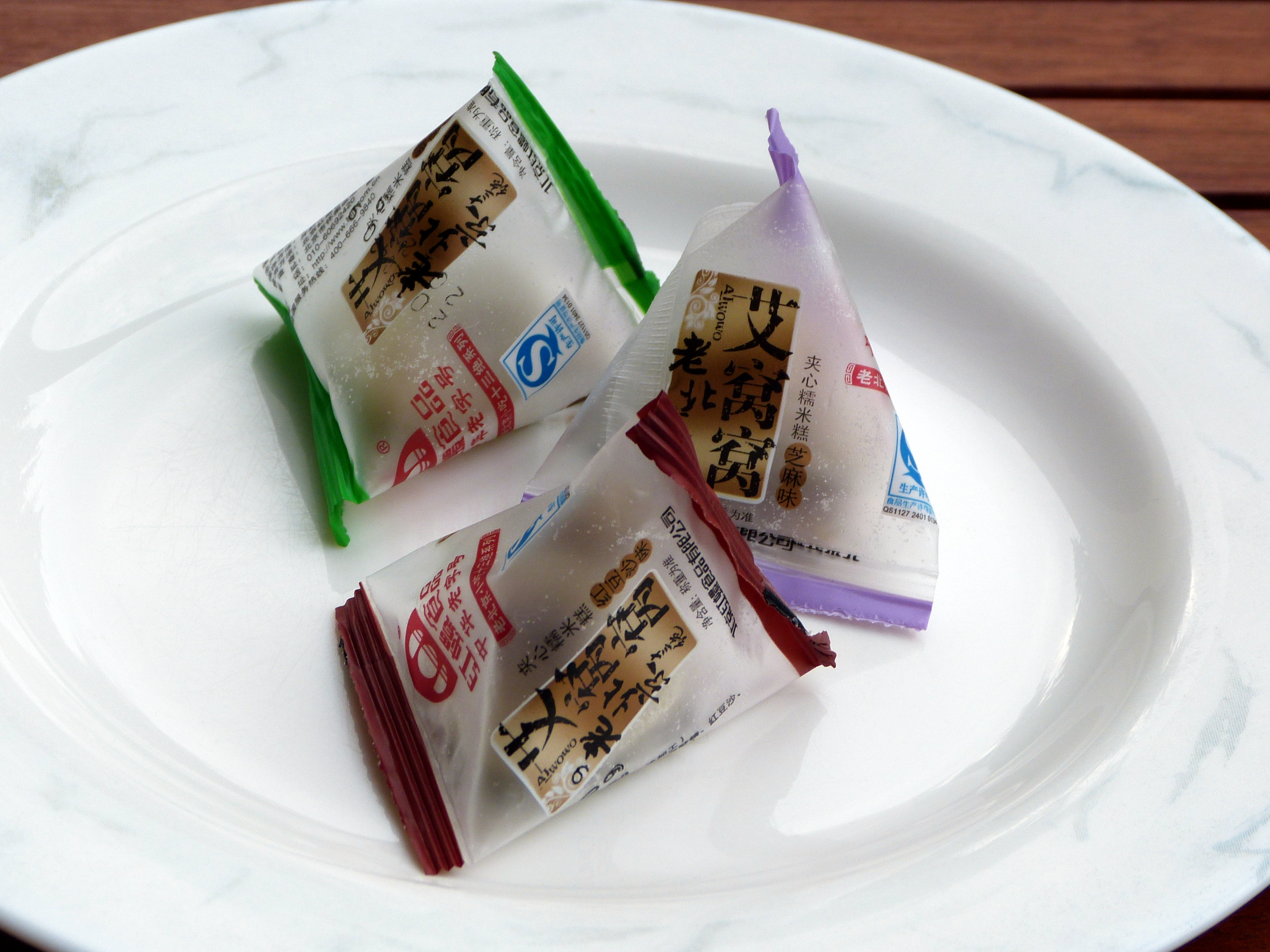 Aiwowo, Klebreisbällchen mit Füllung, industriell gefertigt und einzeln verpackt